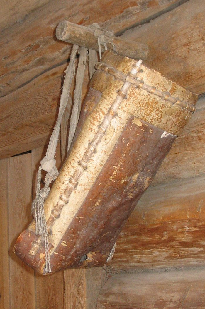 Ein Tragekorb (Kiepe) aus Birkenleder. Selbst fotografiert in einem Museumsdorf am Baikalsee - Sibirien. Autor: Aineias, 21.Sept. 2005